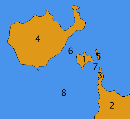 Kräsuli a okolní ostrovy.